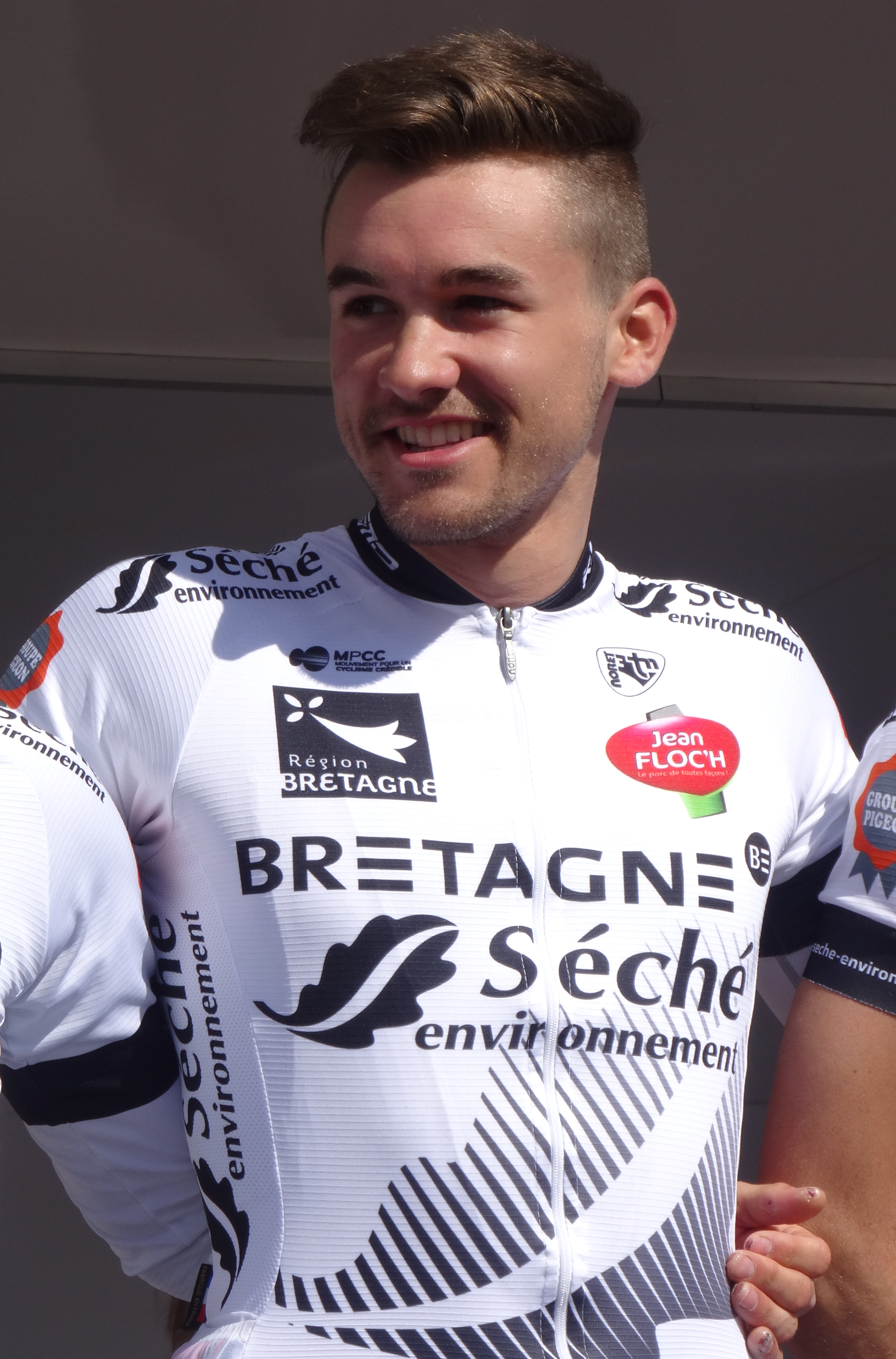 Reportage réalisé le jeudi 17 avril à l'occasion du départ et de l'arrivée du Grand Prix de Denain 2014 à Denain, Nord, Nord-Pas-de-Calais, France.